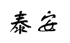 中文（中国大陆）: 文字，字体